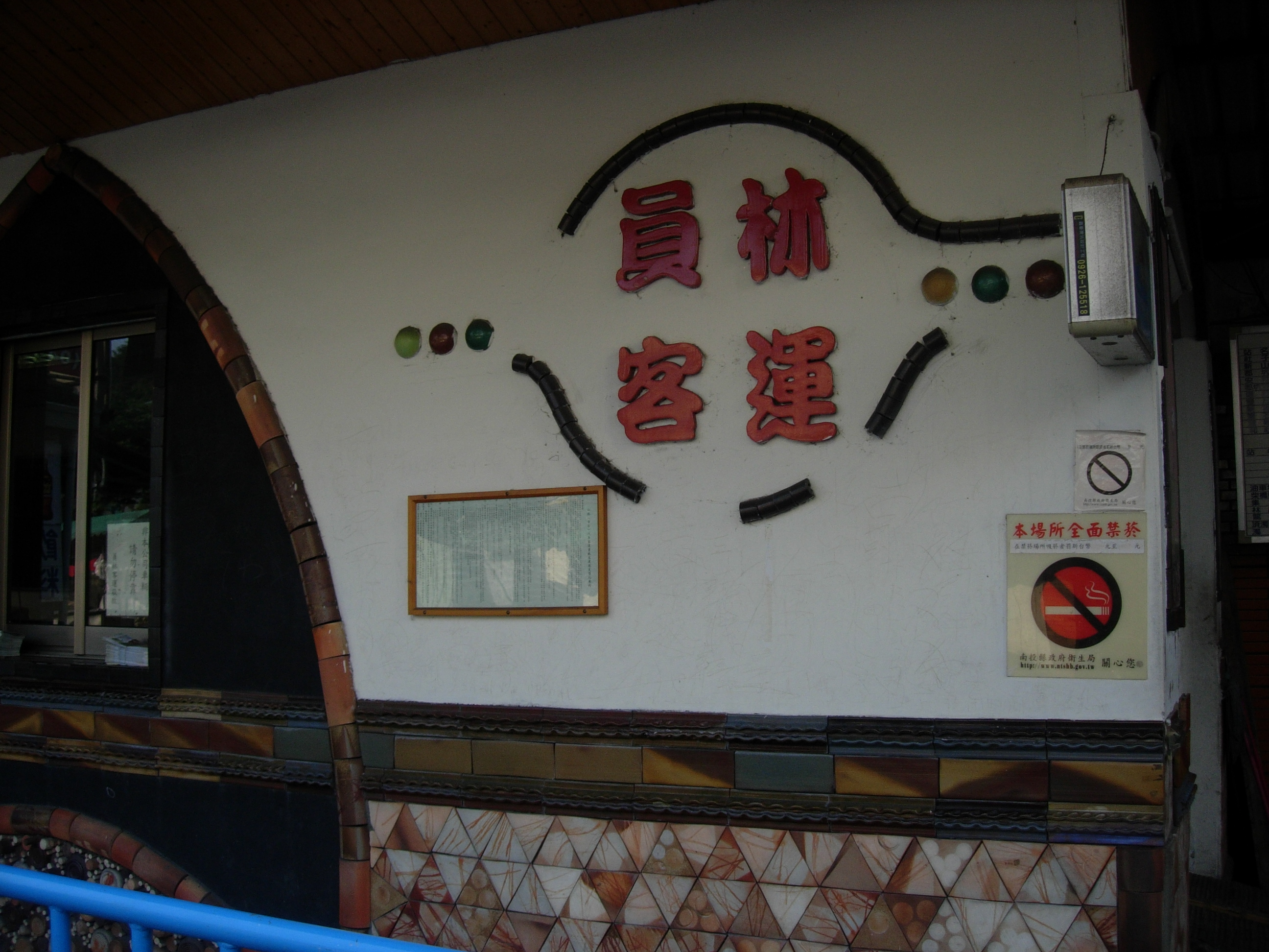 中文（台灣）: 員林客運水里站服務臺